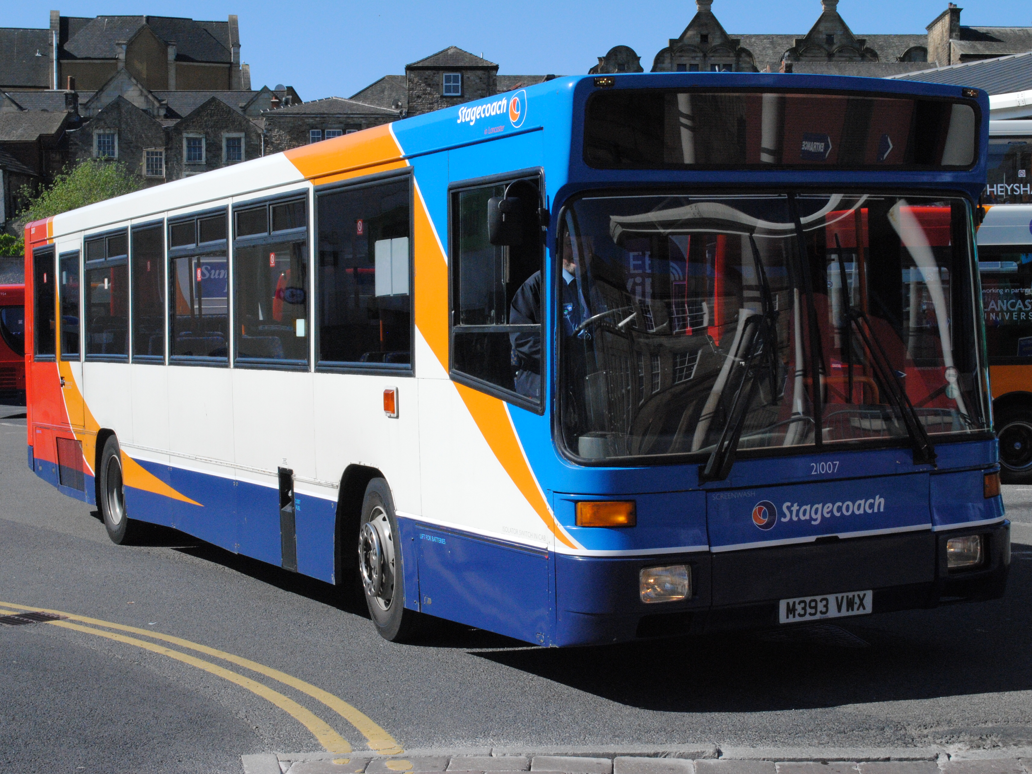 Volvo B10B Alexander Strider